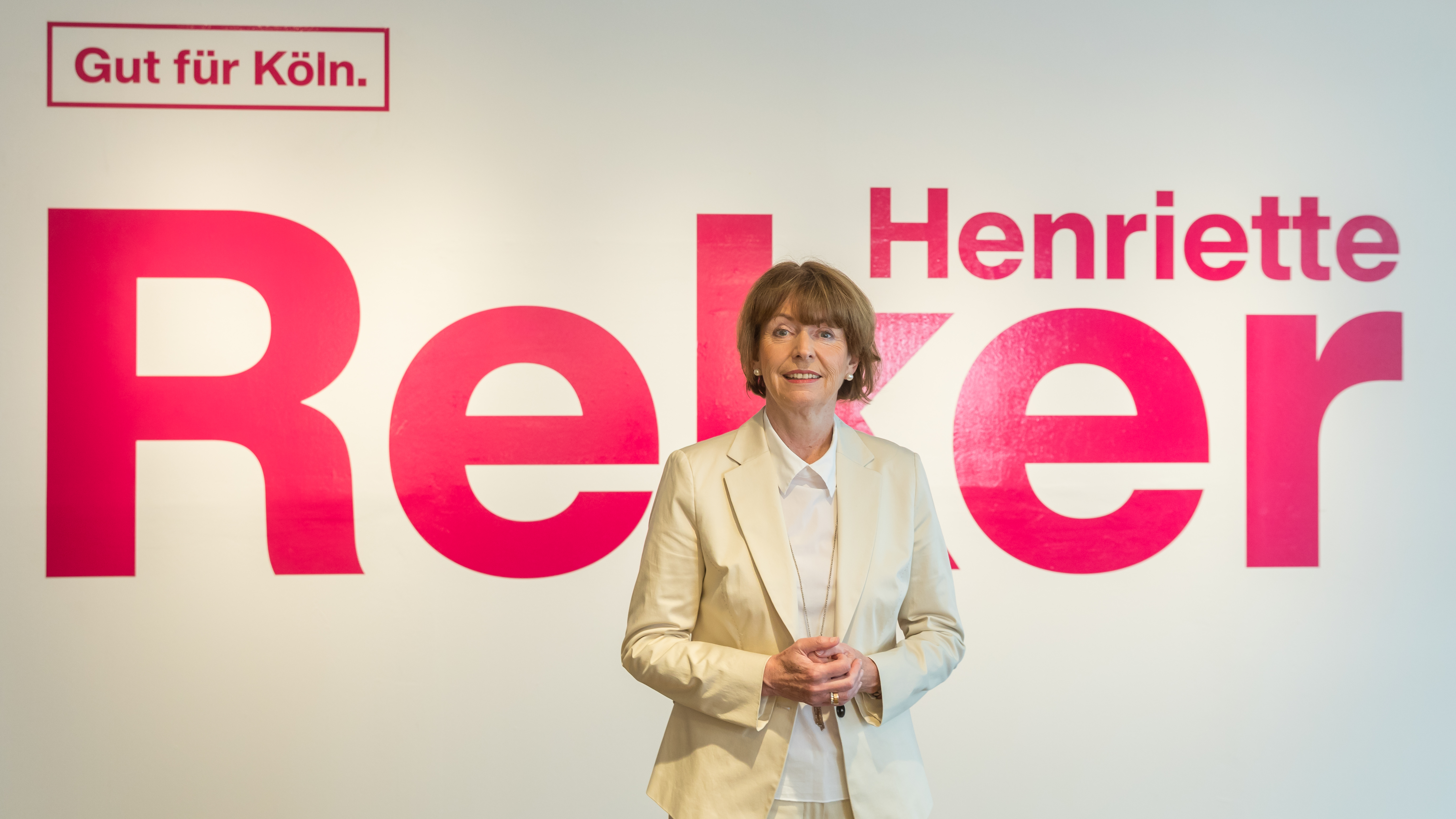 Vorstellung des Wahlprogrammes durch Henriette Reker für ihre Kandidatur zur Oberbürgermeisterinnen-Wahl am 13. September 2020